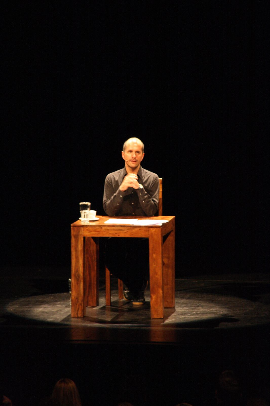 Christoph Maria Herbst am 21. Januar 2007 während seiner Lesetour.